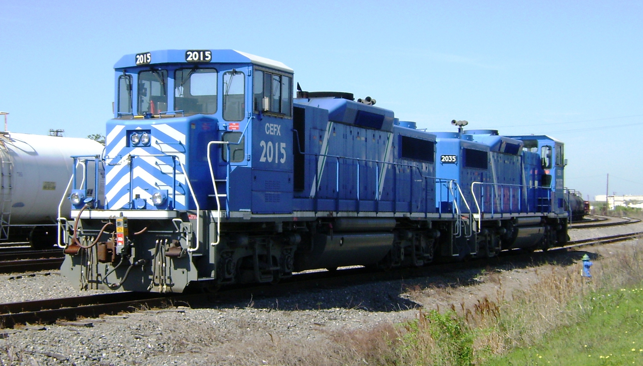 CEFX #2015 EMD GP20D